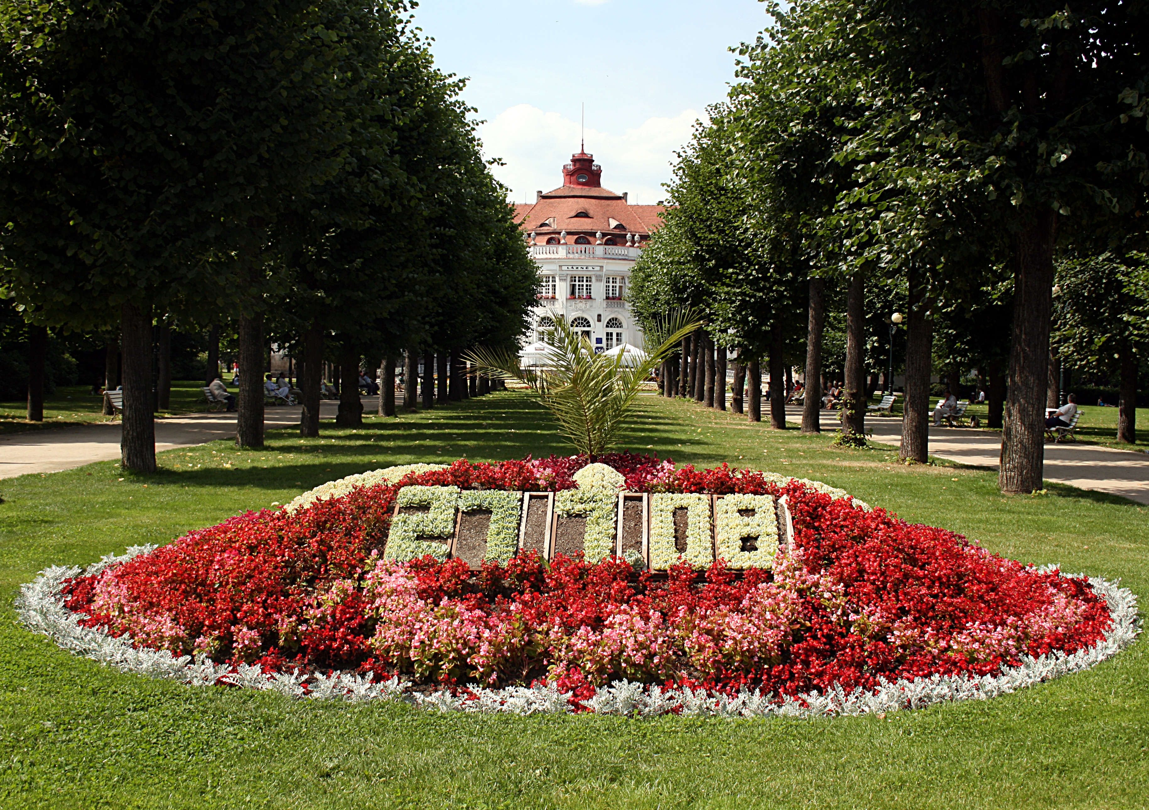 Karlsbad, Elisabethpark,_Blumenbeet_mit_Datum